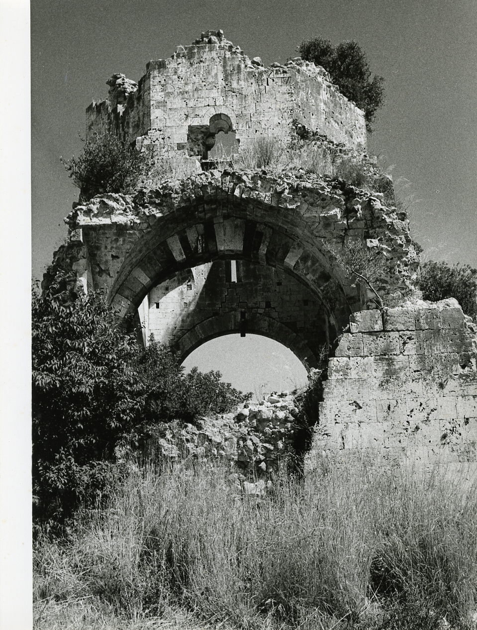 Magliano in Toscana. Rovine del Monastero di San Bruzio. Servizio fotografico : Magliano in Toscana, 1965 / Paolo Monti. - Stampe: 2 : Positivo b/n, gelatina bromuro d'argento/ carta, 24x30. - ((Al verso delle stampe manoscritto numero di negativo corrispondente: 200. Sul coperchio della scatola, manoscritto a pennarello: "Abruzzi, Marche, Umbria". - Occasione: Documentazione per la pubblicazione: Emilio CECCHI, Natalino SAPEGNO (a cura di), Storia della Letteratura Italiana, 9 voll., Milano, Garzanti, 1966 e segg.